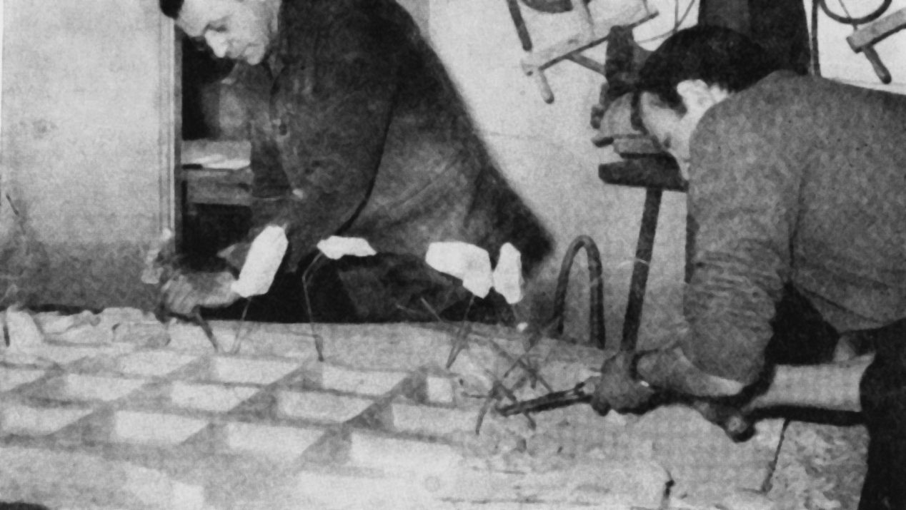 Prace konserwatorskie przy malowidłach z Faras w Muzeum Narodowym w Warszawie. Usuwanie gipsowej kratownicy z odwrocia malowidła